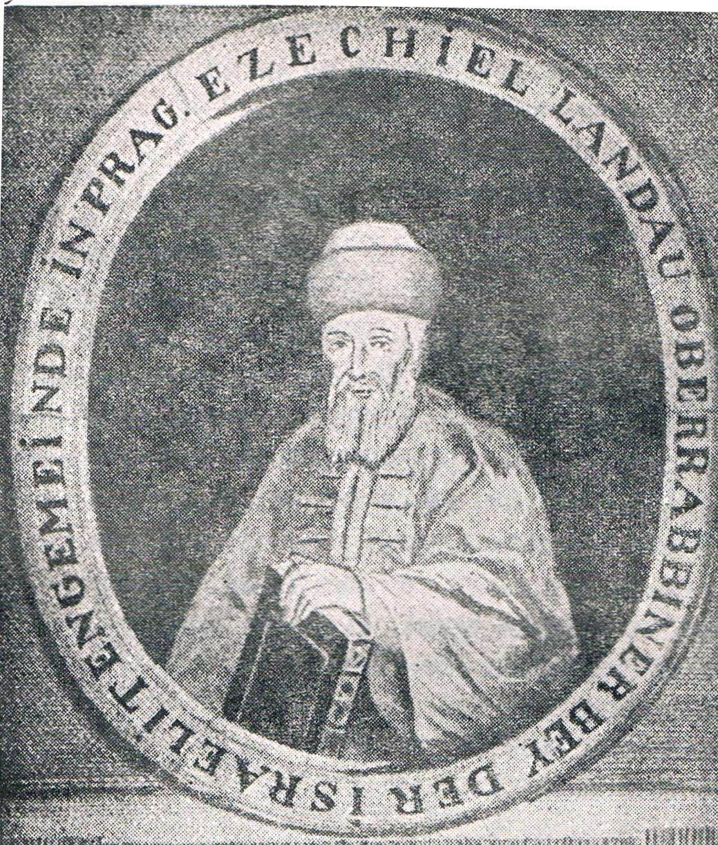 תמונת הנודע ביהודה